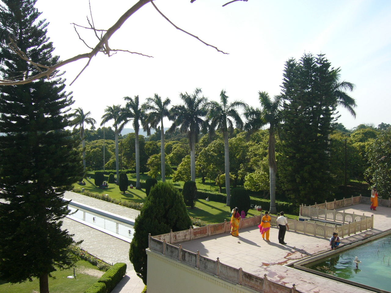 Pinjore Garden Chandigarh India